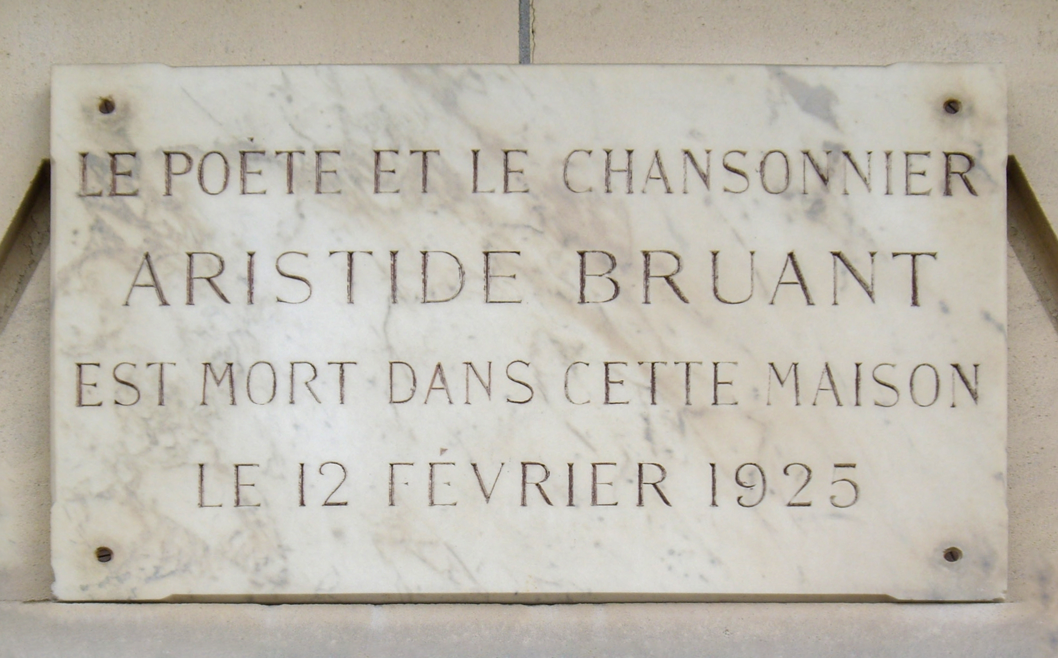 Plaque commémorative, 17 rue Christiani, Paris 18e. « Le poète et le chansonnier Aristide Bruant est mort dans cette maison le 12 février 1925. »